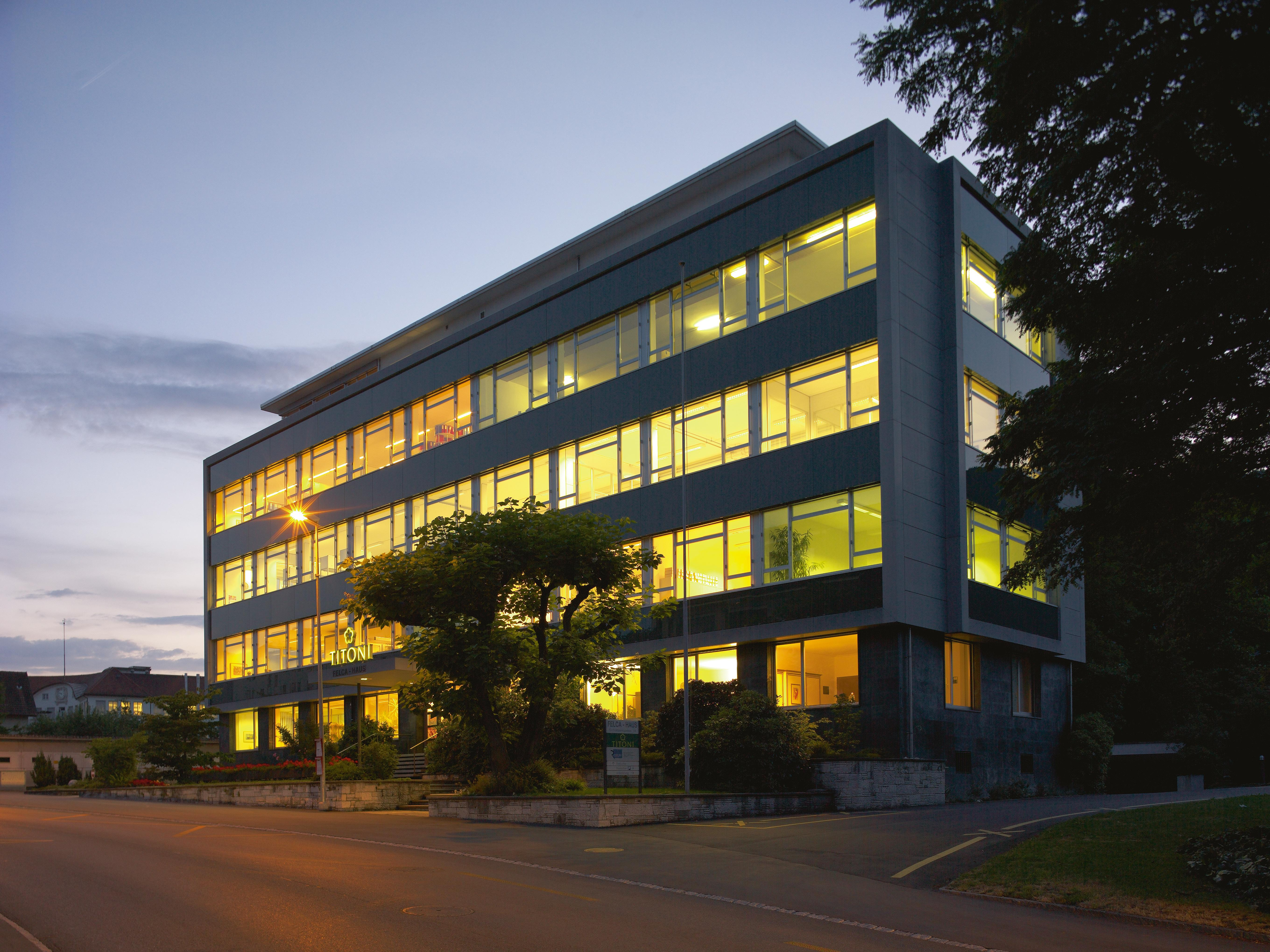 Firmengebäude der Schweizer Uhrenfirma TITONI LTD